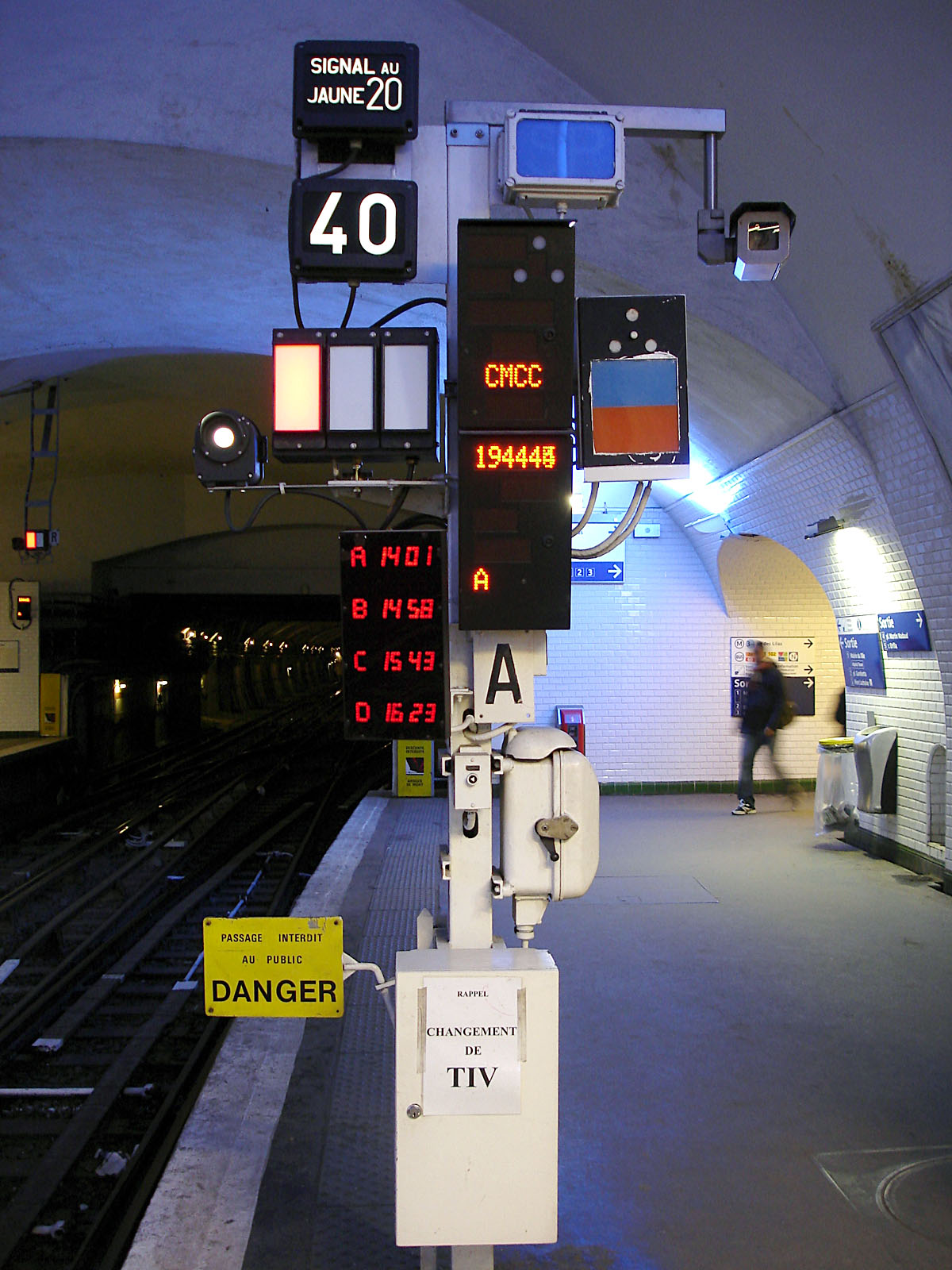 Mât de signalisation (DSO-AA_HS-SS et SSO) à la station Gambetta de la ligne 3 du métro de Paris, France.